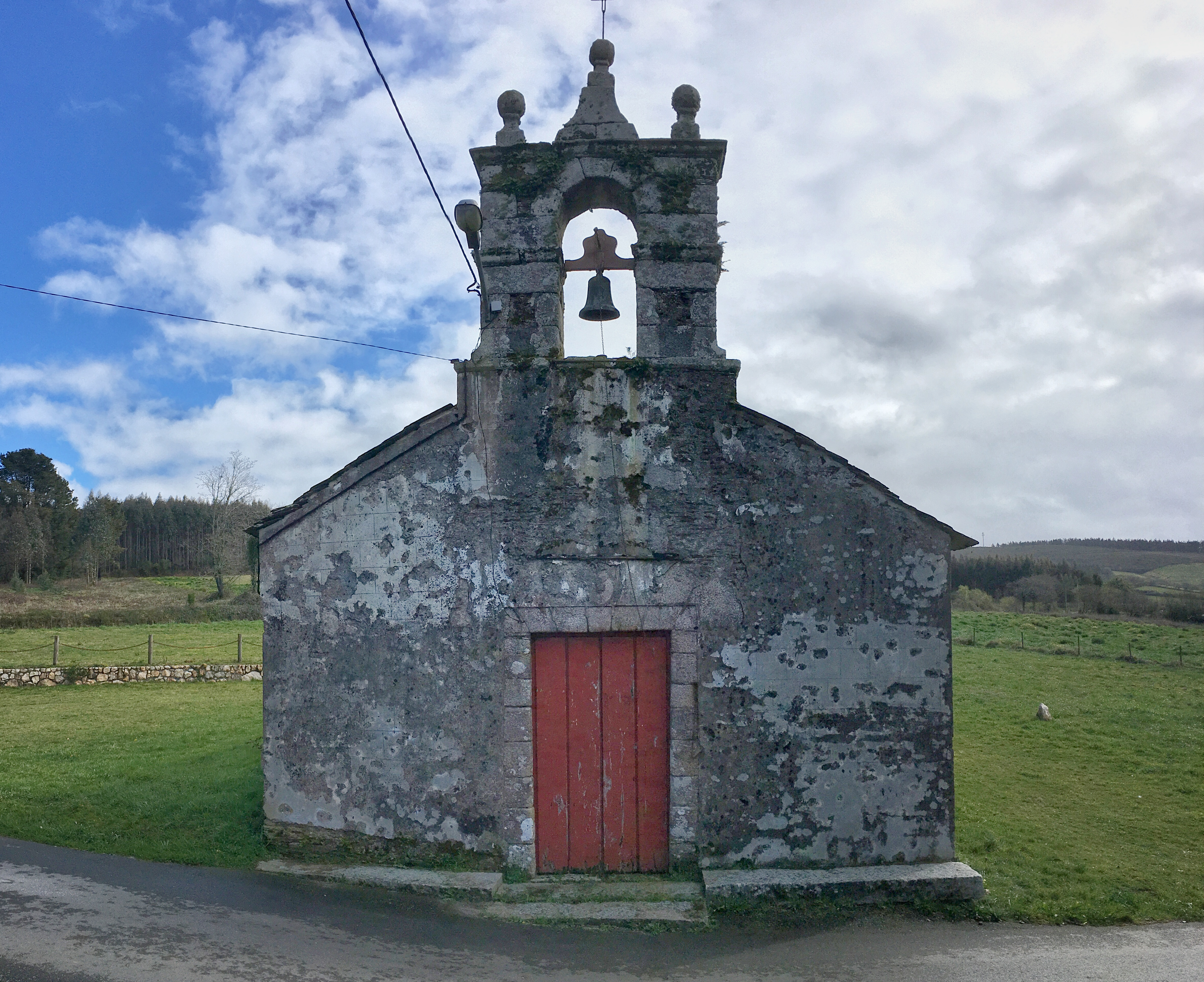 Fronte da igrexa da parroquia de Cabaneiro